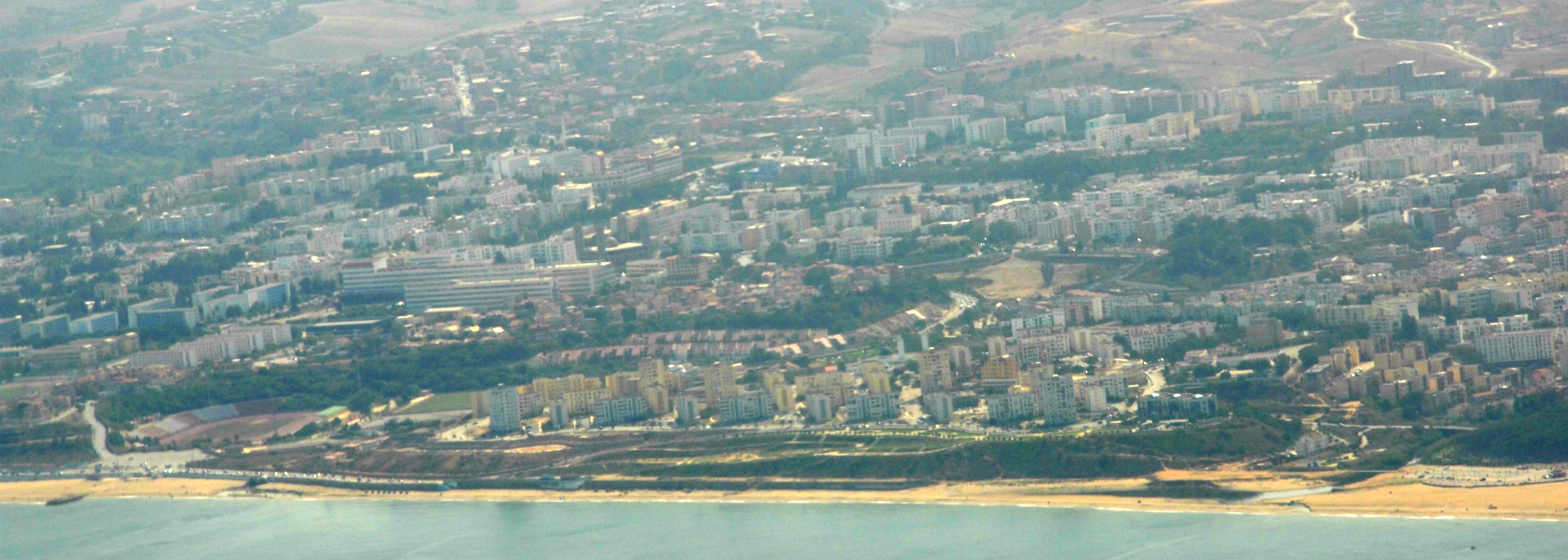 photo aérienne panoramique de Boumerdes